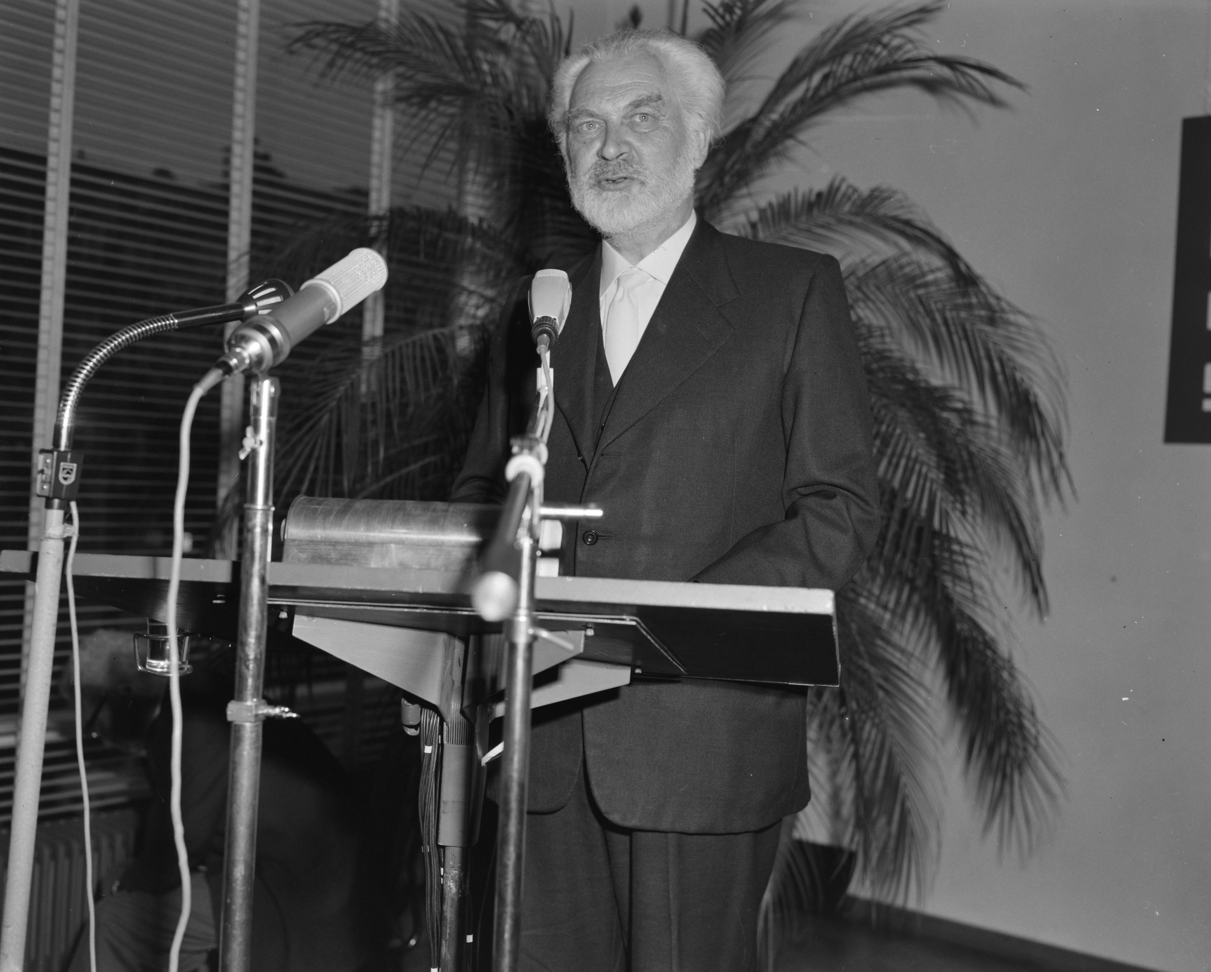 Collectie / Archief : Fotocollectie Anefo Reportage / Serie : [ onbekend ] Beschrijving : In Stedelijk Museum Sikkensprijzen uitgereikt, Van de Bundt Datum : 26 september 1964 Trefwoorden : Musea, prijzen, uitreikingen Instellingsnaam : Sikkensprijs Fotograaf : Bilsen, Joop van / Anefo Auteursrechthebbende : Nationaal Archief Materiaalsoort : Negatief (zwart/wit) Nummer archiefinventaris : bekijk toegang 2.24.01.04 Bestanddeelnummer : 916-9290